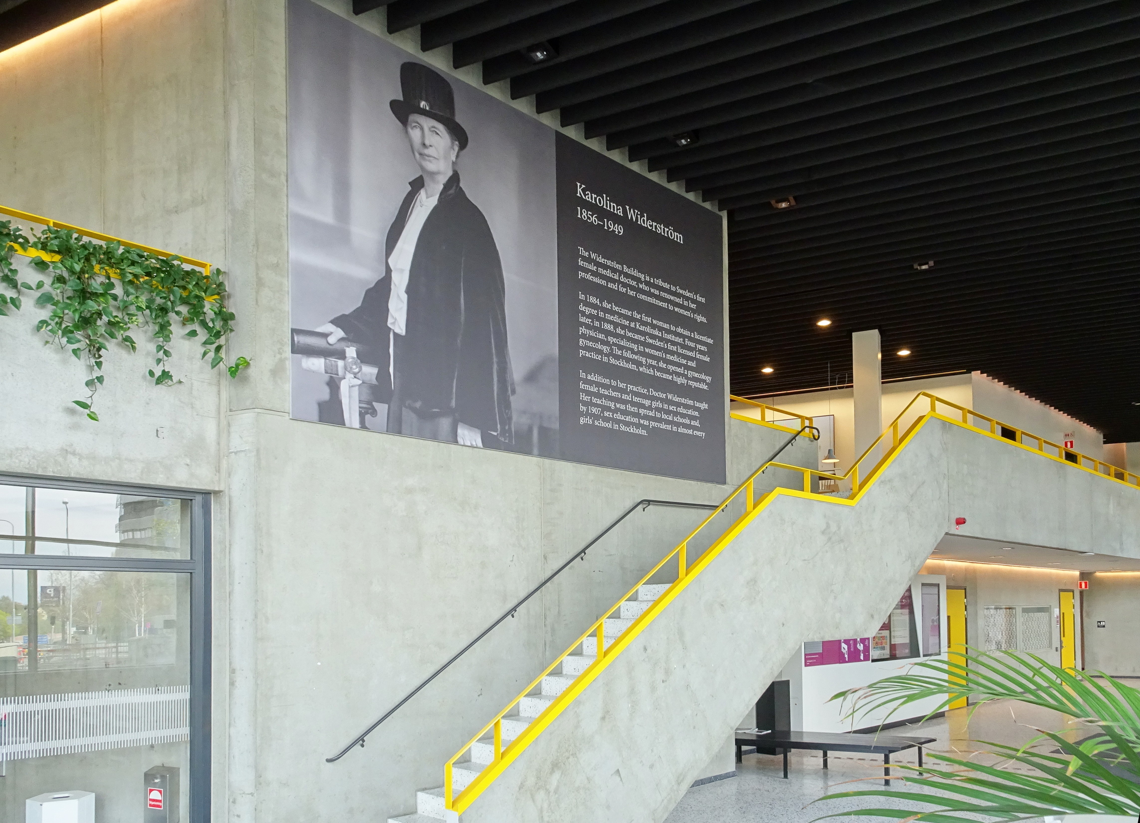 Widerströmska huset